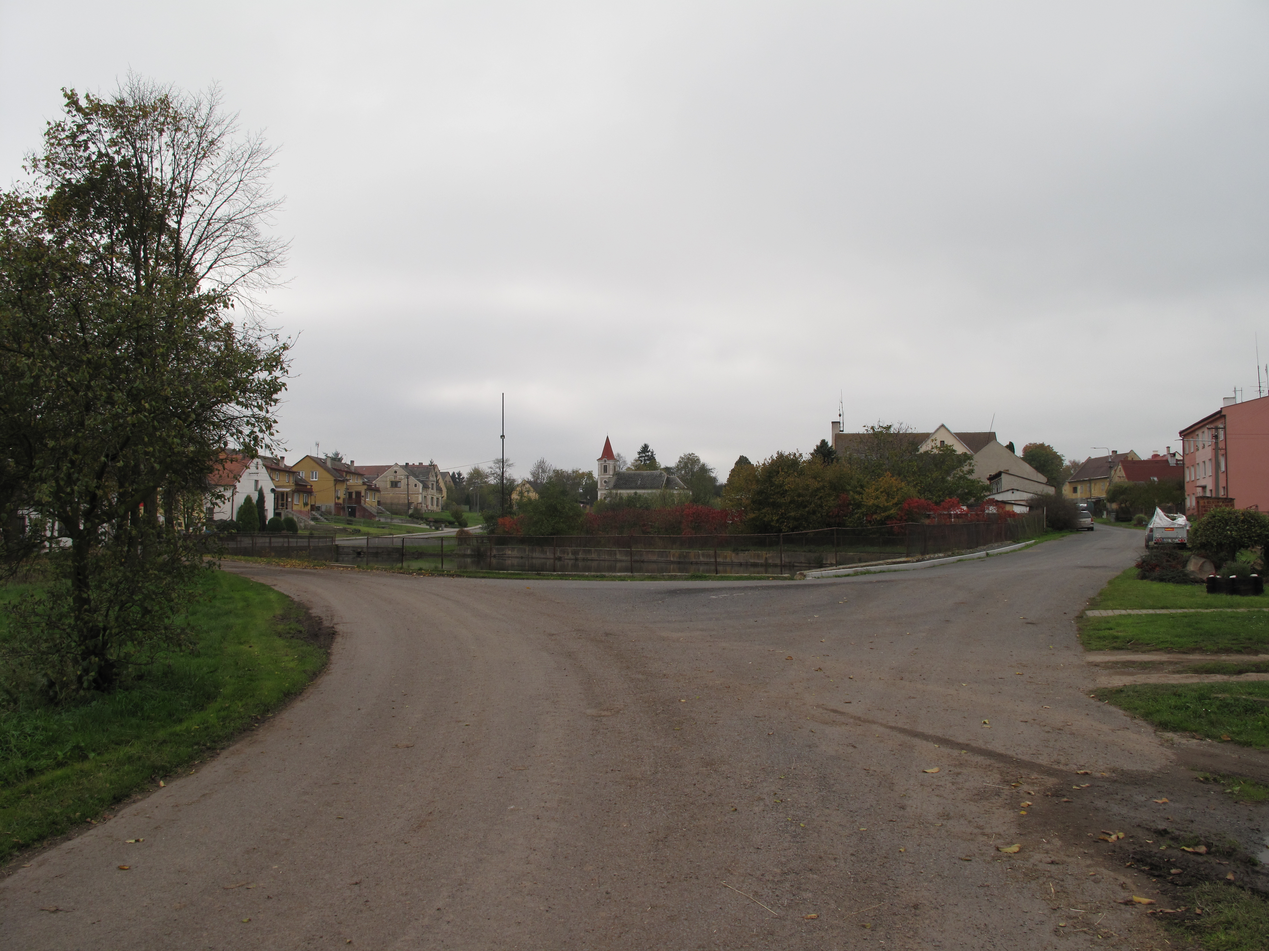 Rozcestí v Pšově. Okres Karlovy Vary, Česká republika.